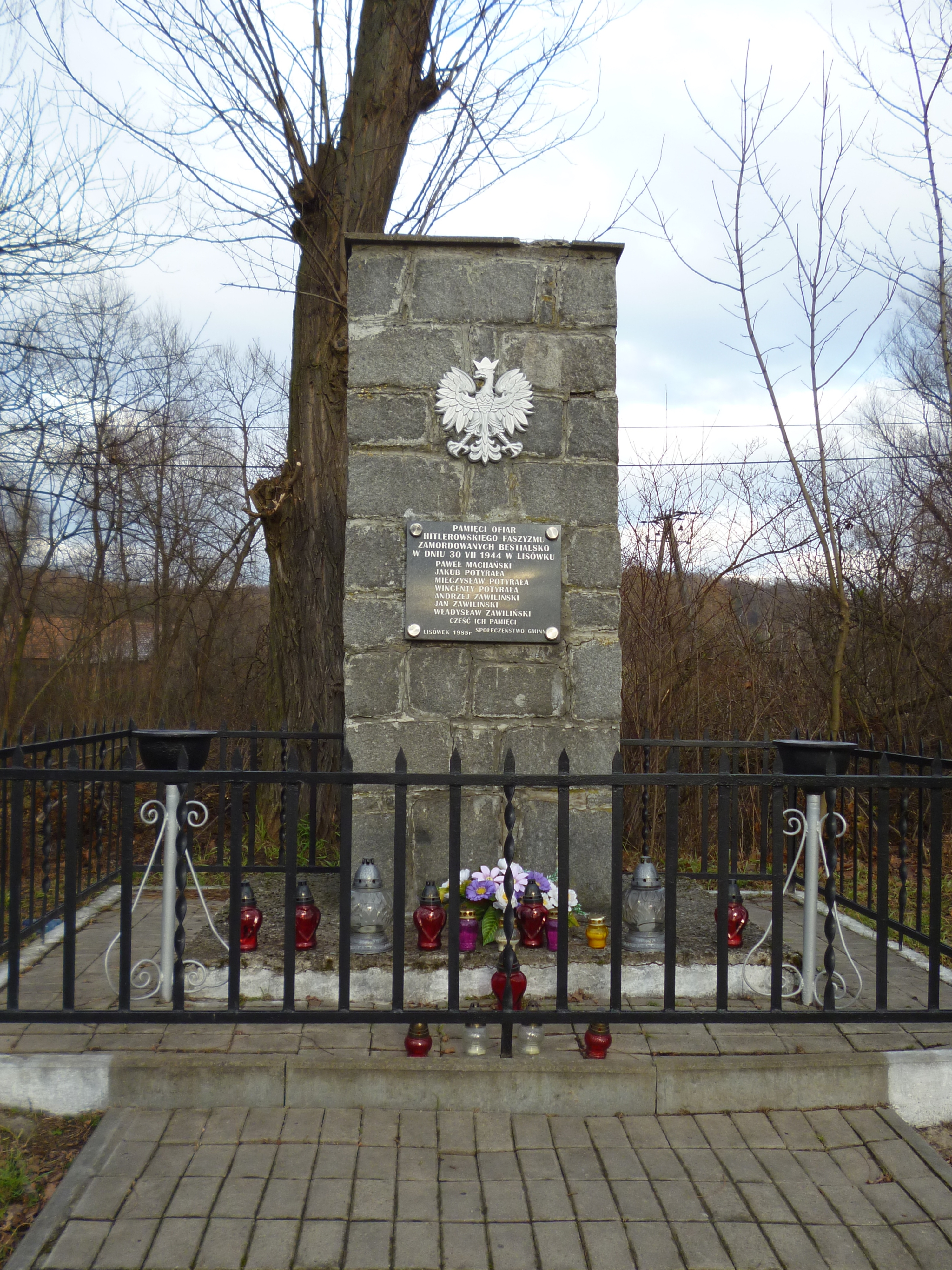 Pomnik ofiar egzekucji dokonanej przez Niemców w 1944 roku Lisówku